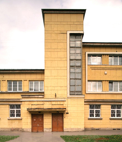 Кировский профилакторий, архитектор О.Л.Лялин 1927 год, Ленинград (Санкт-Петербург).